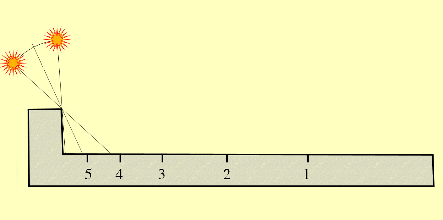 Projections de l'ombre du Soleil, à midi, aux solstices, à Louxor.